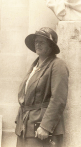 Dorothea Bate a Valetta. Abril 1934